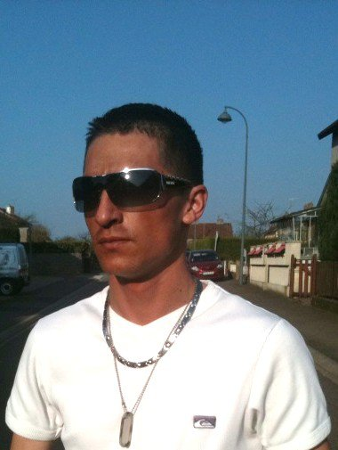 Fabien Biancalani en 2011